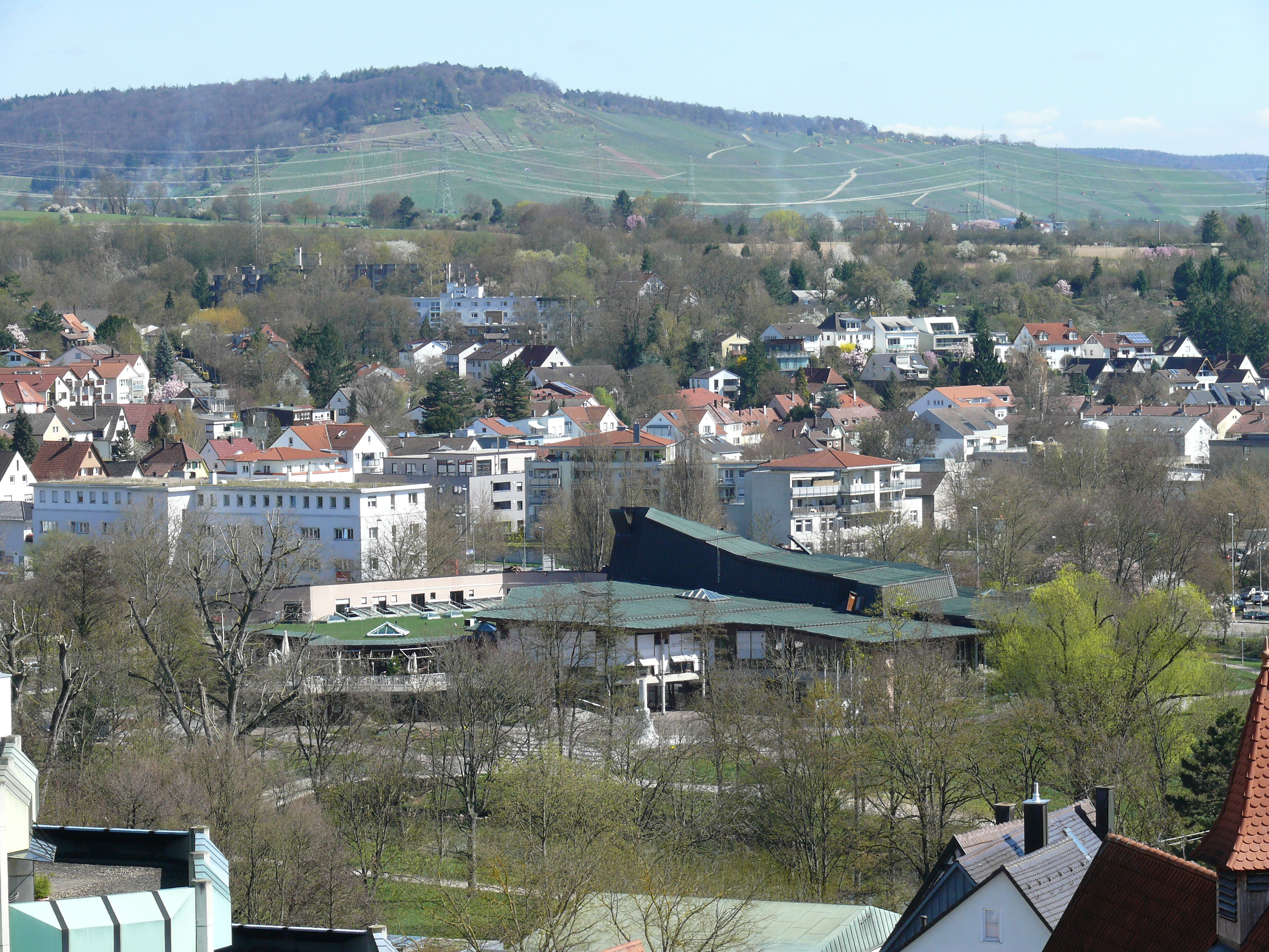 Das Bürgerzentrum in Waiblingen. Blick vom Hochwachtturm.